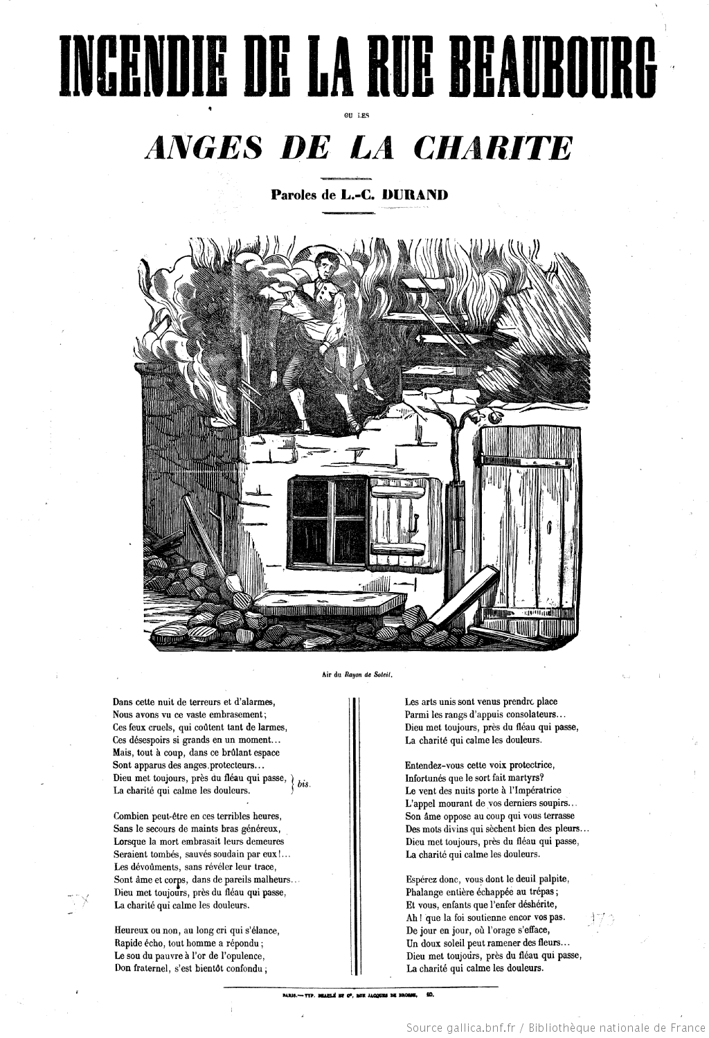 Chanson de Louis-Charles Durand (1804-1863) éditée en feuille volante illustrée.